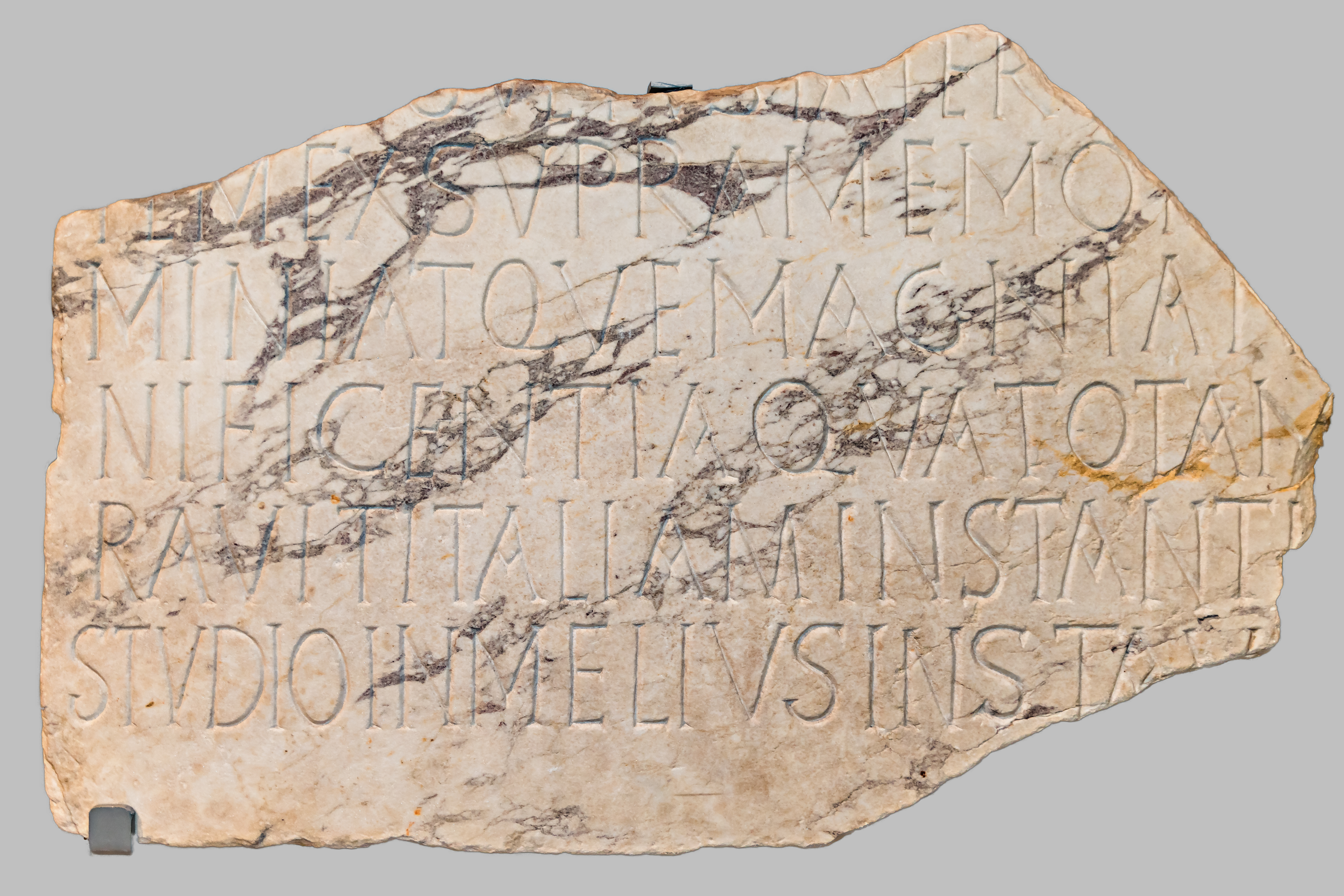 Die Inschrift aus der Exedra der Crypta Balbi in Rom wird zwischen den Jahren 471 und 550 n.Chr. datiert. Der Text bezieht sich nach Ansicht der modernen Forschung auf Theoderich, den König der Ostgoten, der für die Restaurierung einiger bedeutenden Bauwerke der römischen Geschichte, die sich im Laufe der Zeit sanierungsbedürftig zeigten, gesorgt hatte.